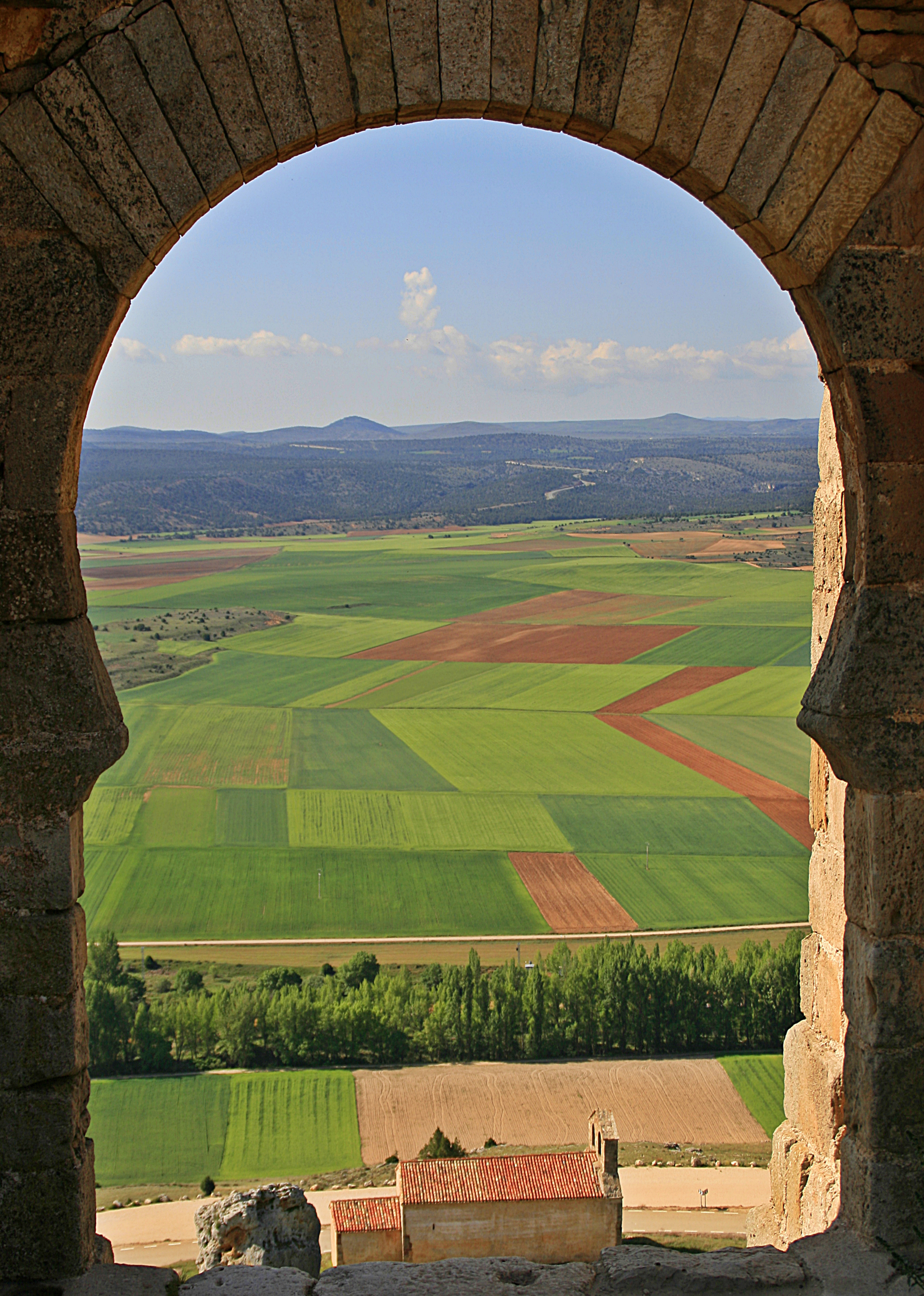 Gormaz, Soria, España.